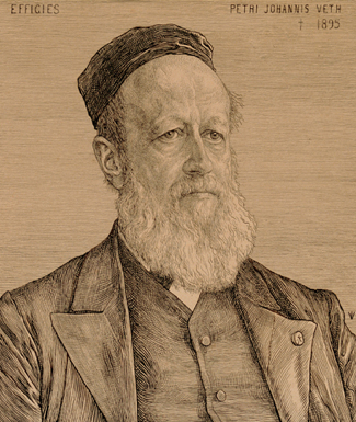 Pieter Johannes Veth (1814-1895)